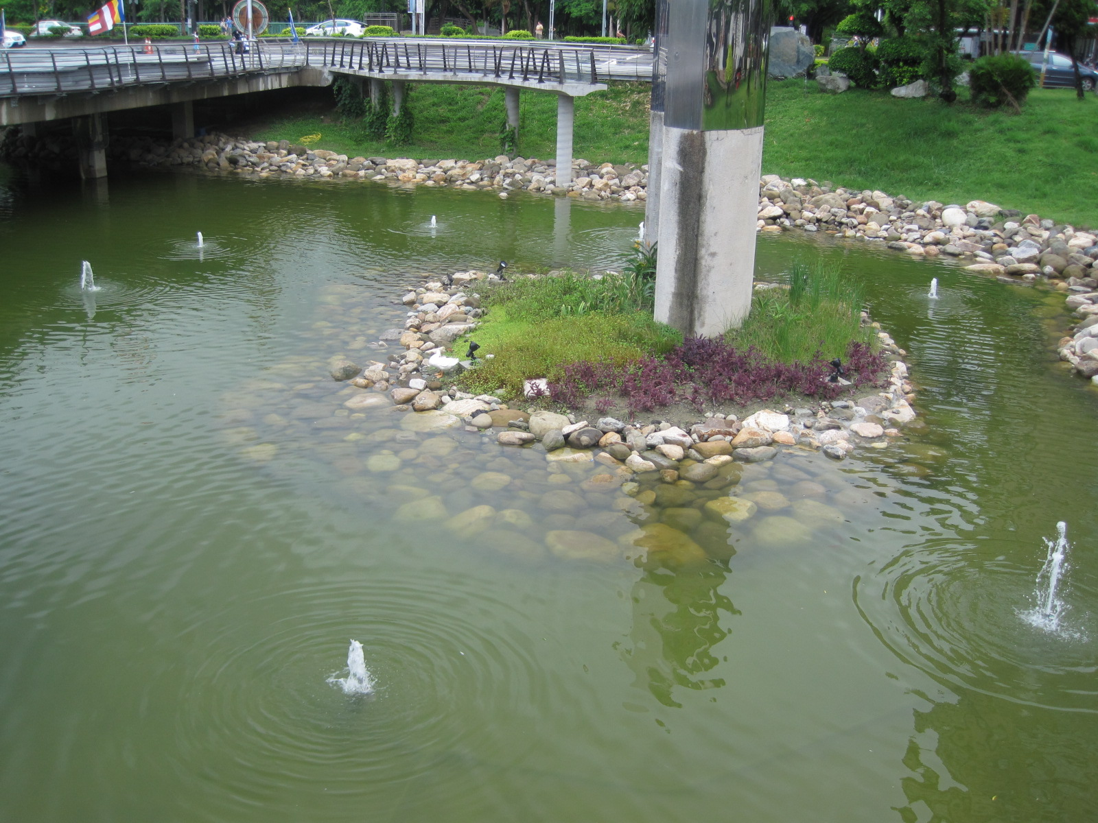 臺南市立文化中心水池。